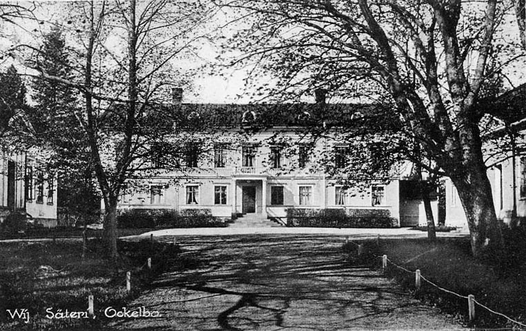 Wij säteri, Ockelbo